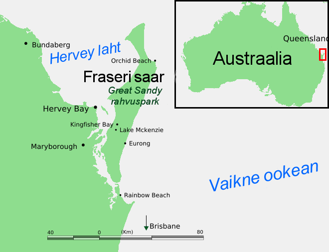 Fraseri saar